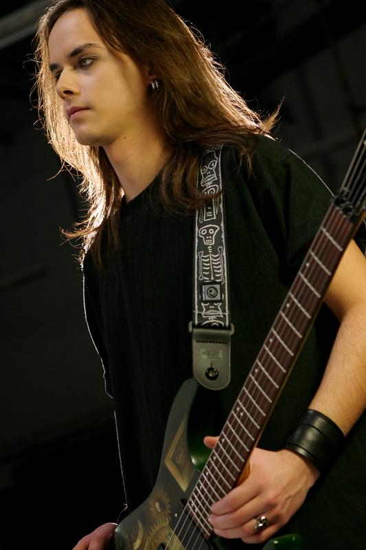 Бобан Василески